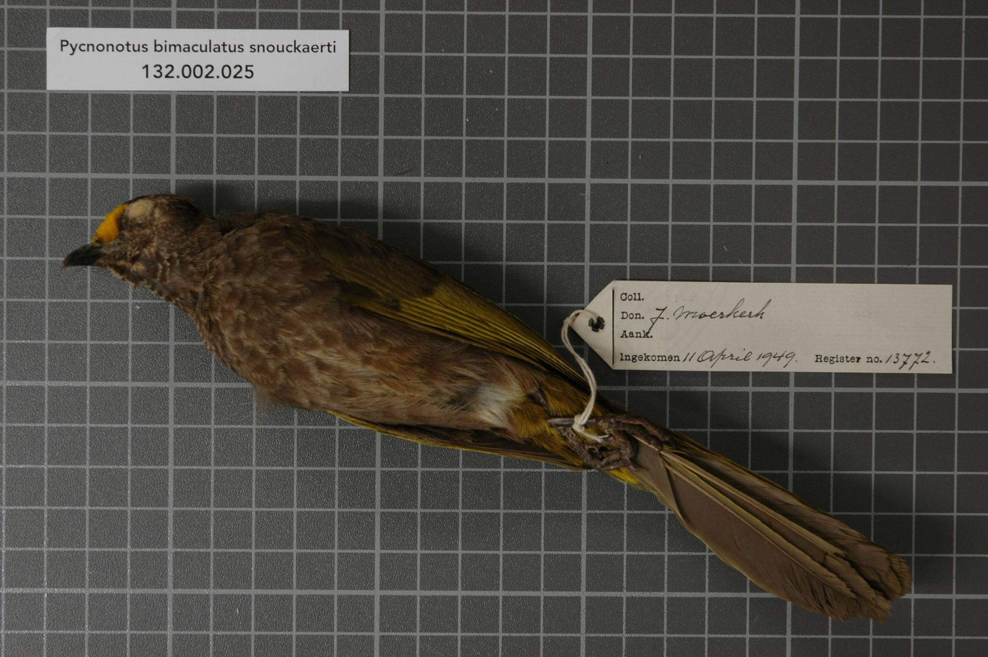 Pycnonotus bimaculatus snouckaerti Siebers, 1928